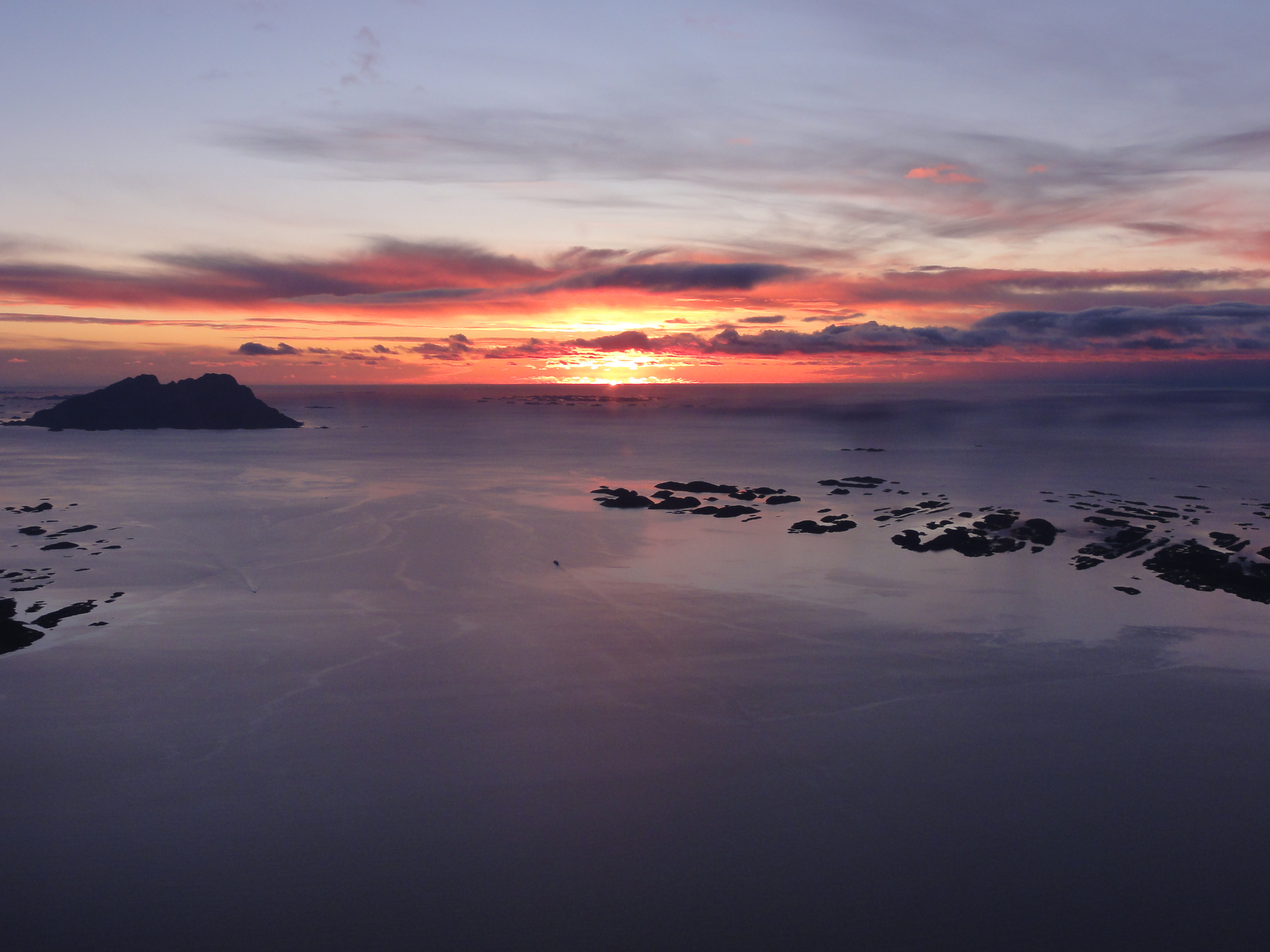 Karlsøyfjorden utenfor Kjærringøya i Bodø kommune. Landegode sees som den markerte øya lengst ut mot høyre.